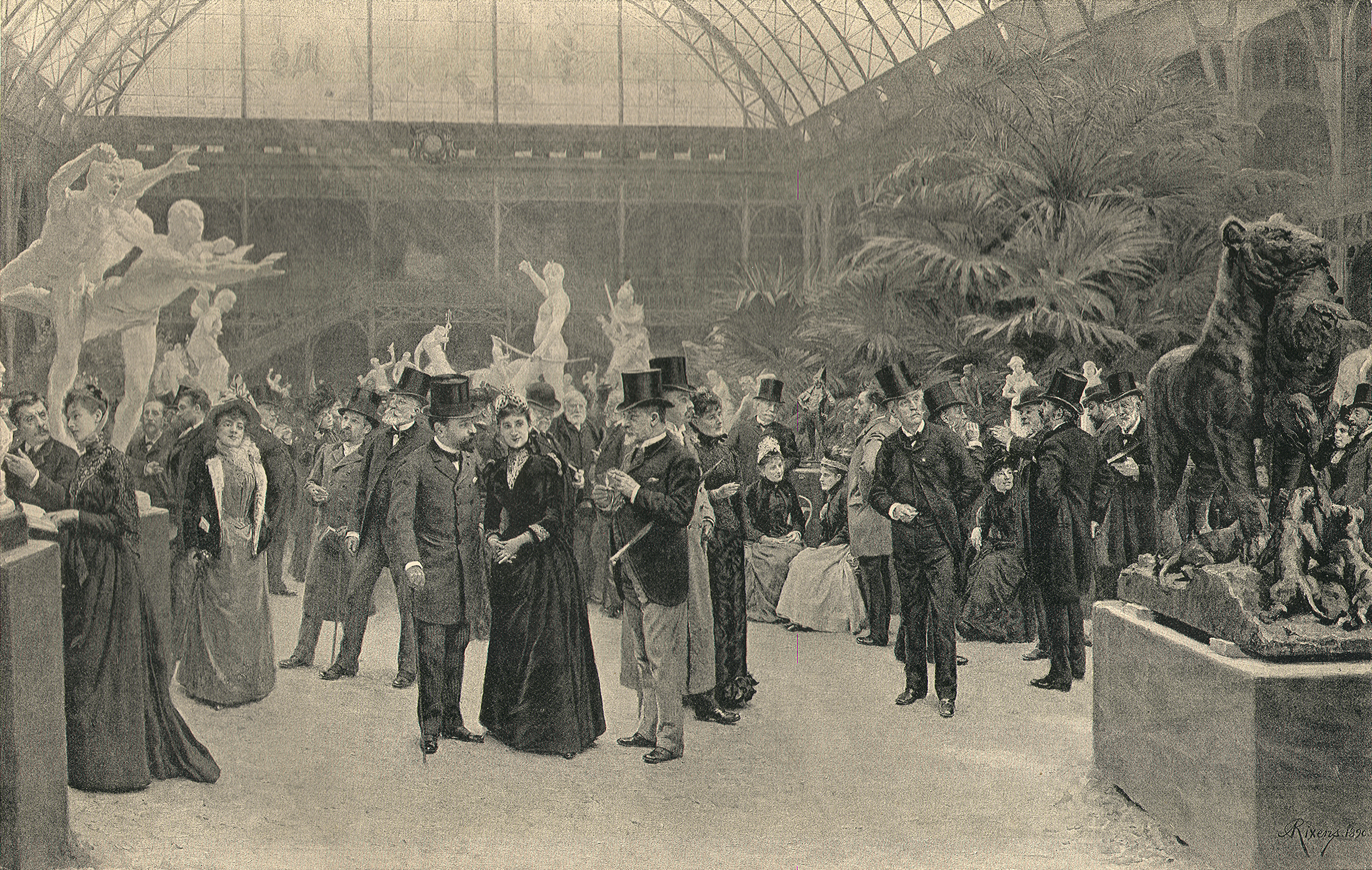 Un Jour de vernissage au palais des Champs-Élysées (1890) par [Jean-André Rixens] . Salon de la Société nationale des beaux-arts de 1890. A droite:Tigresse apportant un paon à ses petits par Auguste Cain.